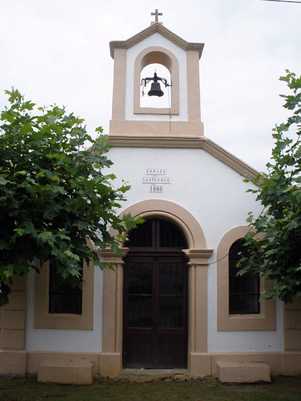 Ermita de San Roque (Cóbreces, Cantabria)